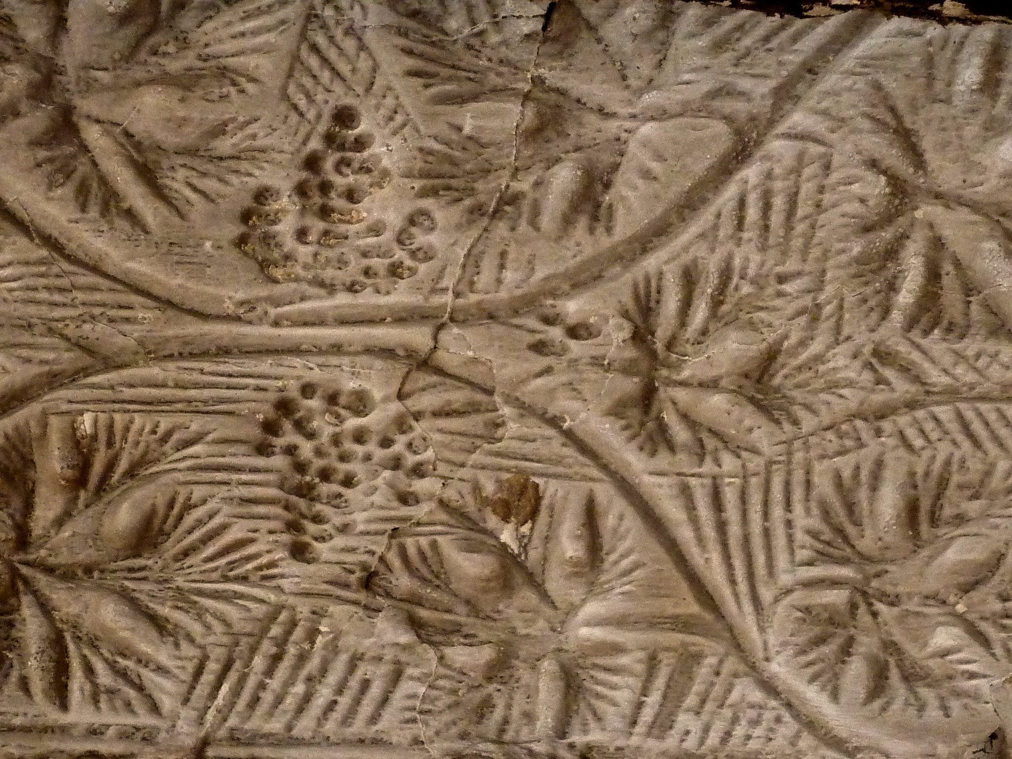 Portal de la Vila (Torà): artesonat de guix al sostre del portal